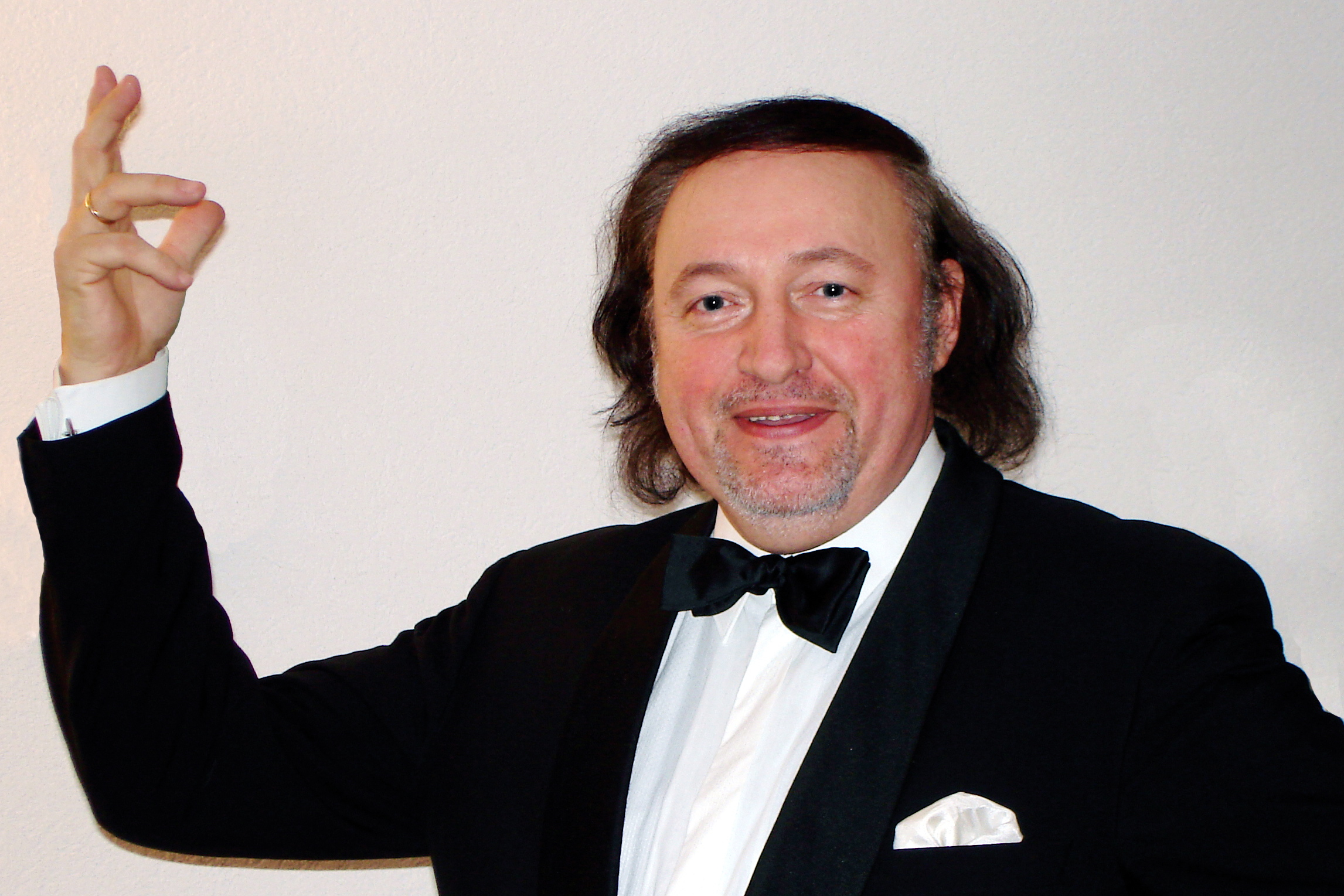 Sie dürfen das Foto mit Nennung des Autors honorarfrei vervielfältigen, verbreiten und öffentlich zugänglich machen. Foto: Svetlana Stoliarova /